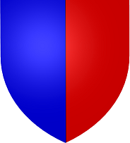 Blason Héraldique Bleu Rouge Source:Wiki-MG**** @@@-fr Accueil Accueil 08:58, 18 November 2006 (UTC) Licence:GFDL